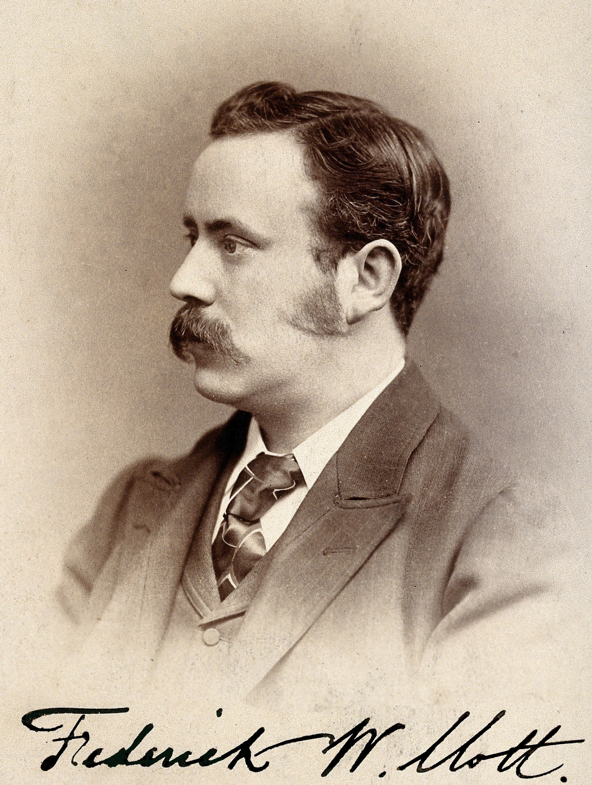 Sir Frederick Walker Mott